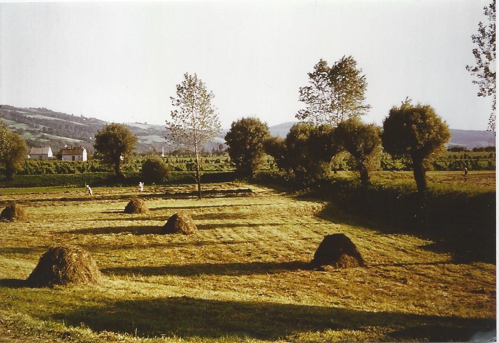 landscape at Isep, near Wojnicz, Lesser Poland